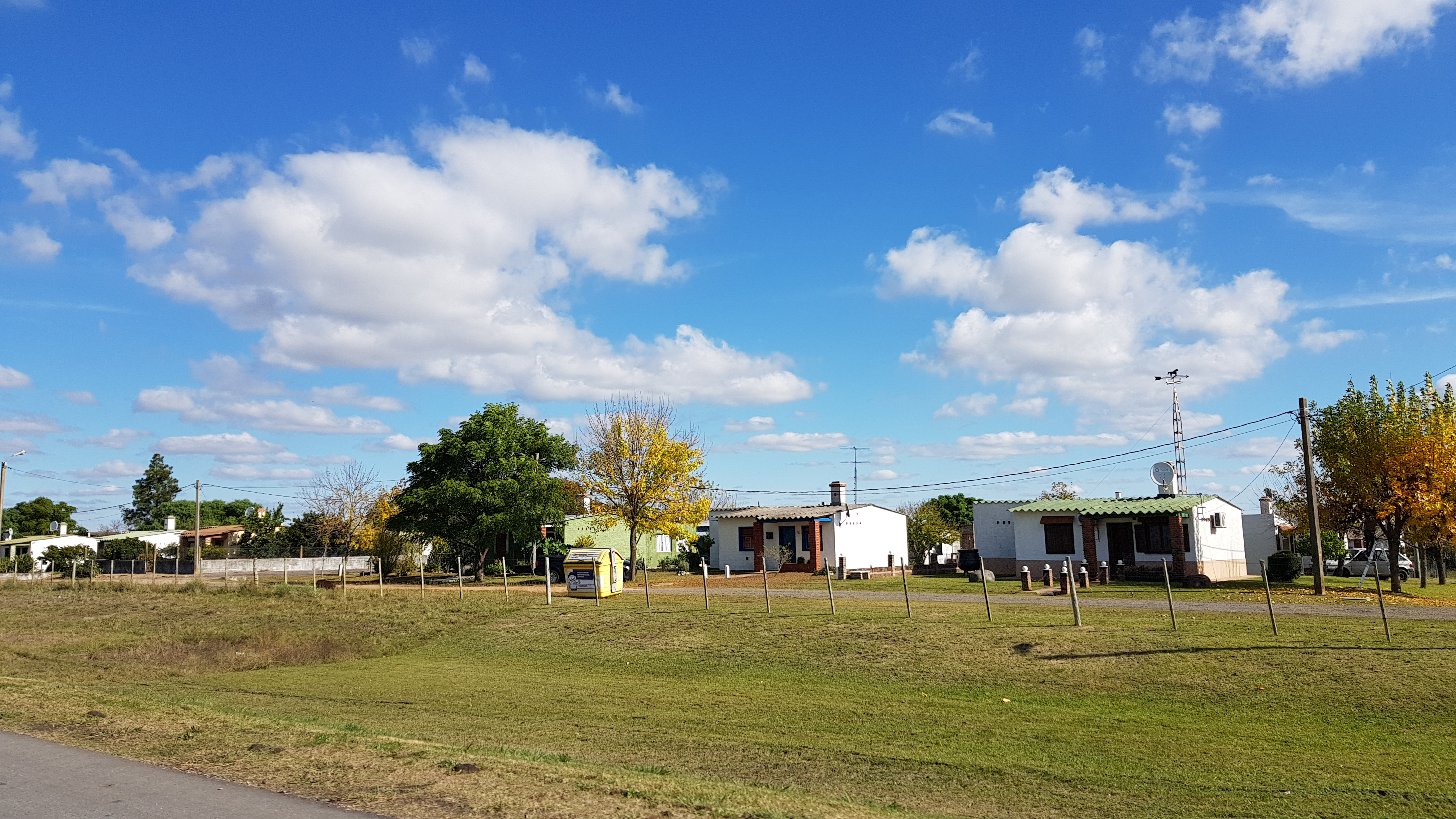 Vista de San Gregorio de Carro desde la ruta 3 (departamento de San José, Uruguay)